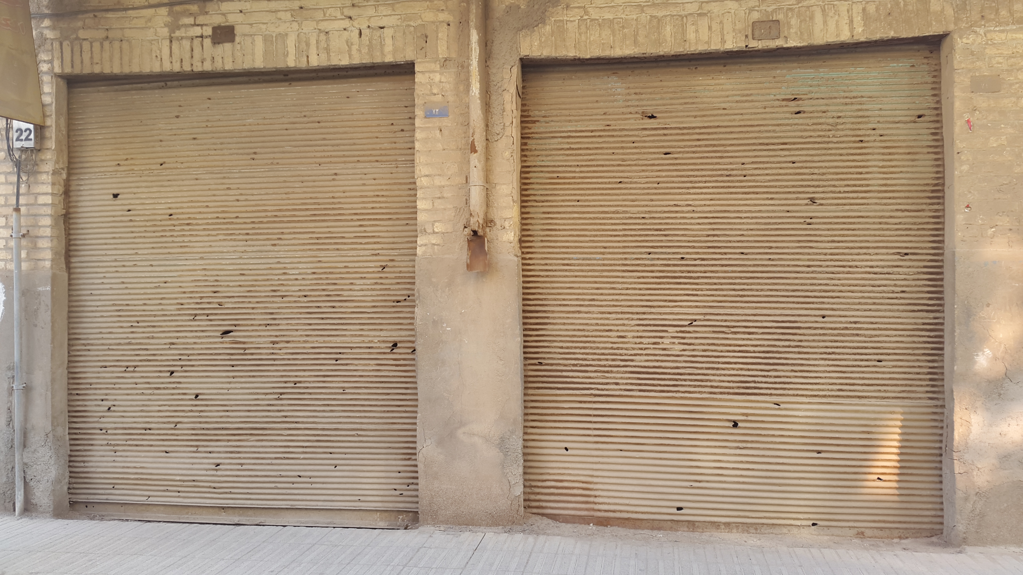 آثار ترکش خمپاره بر روی کرکره یک مغازه در خیابان طالقانی شهر آبادان